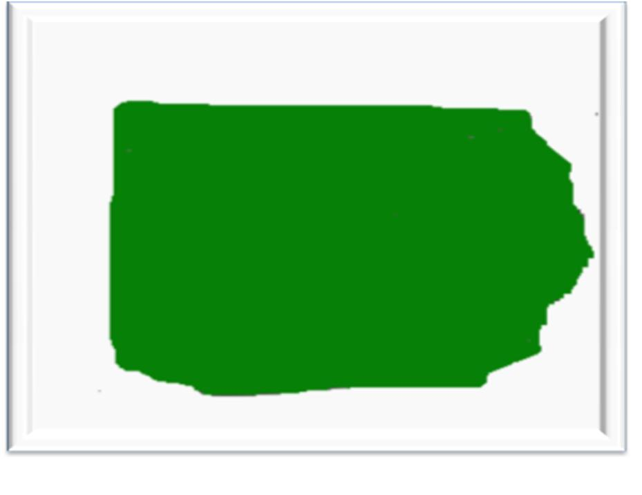 barrio la piedra, san pedro de macorís, republica dominicana